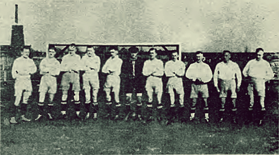 Oberschlesische Bezirksmeister SC Vorwärts Gleiwitz.Von links nach rechts: Kanz, Pirzek, Schmidt, Hollmann, Fuchs, Gitschmann, Wilschek, Müller, Henn, Furgoll, Skiba.